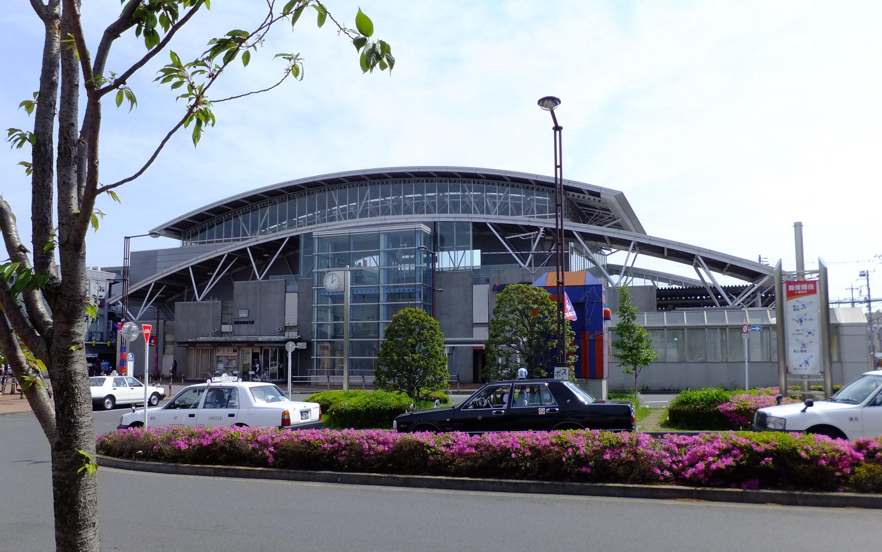 飛田給駅北口